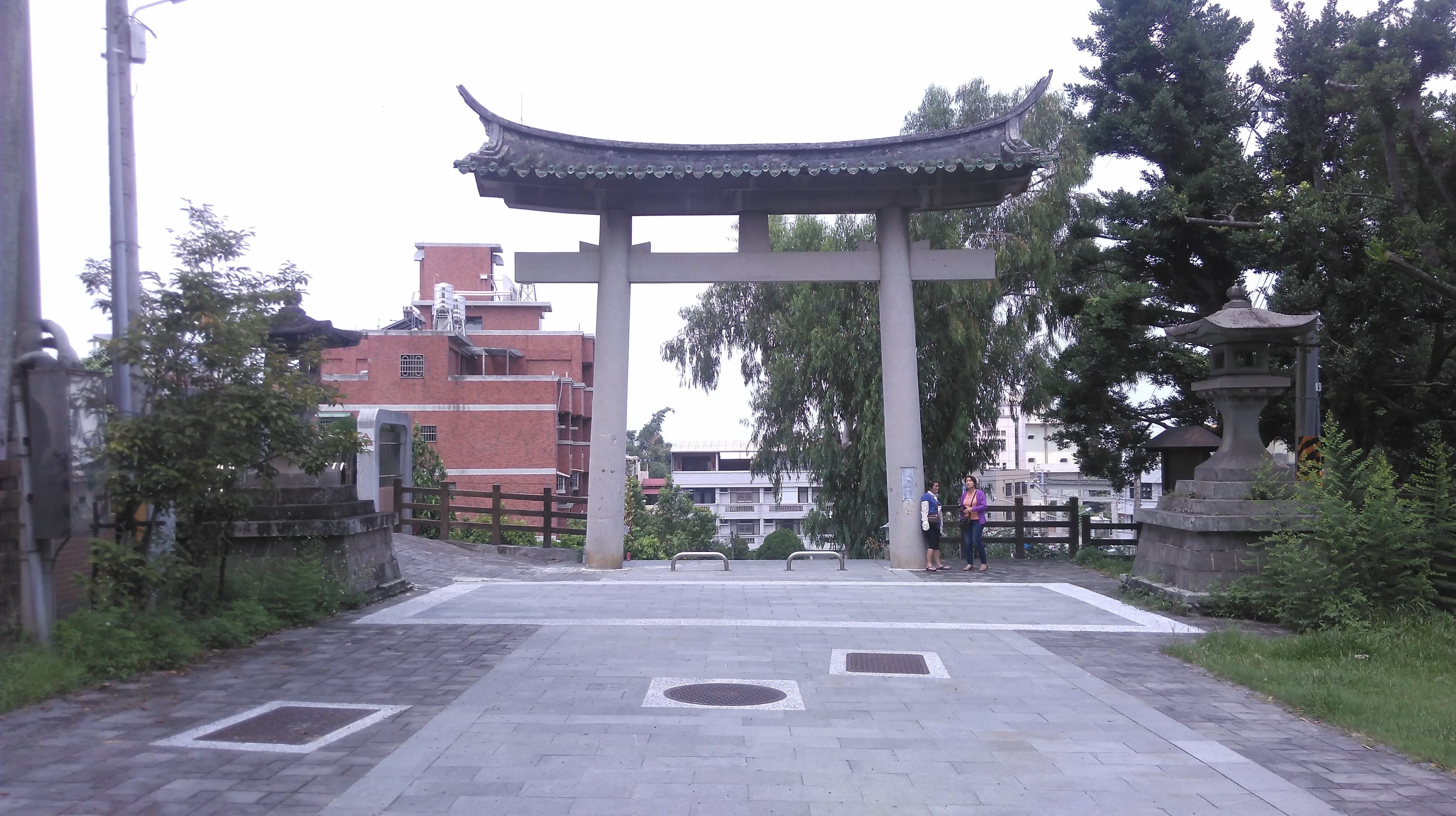 林內神社第二鳥居以及附近的石燈籠